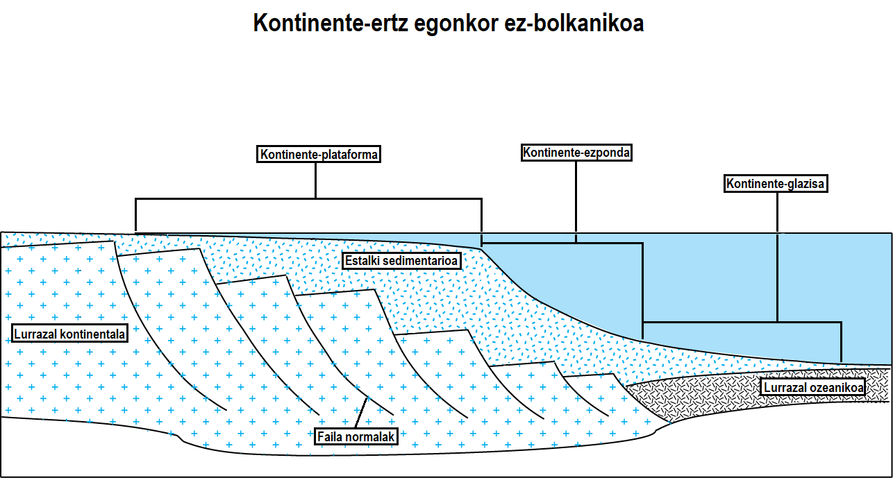 Kontinente-ertz egonkor ez-bolkanikoaren barne egitura simplifikatua